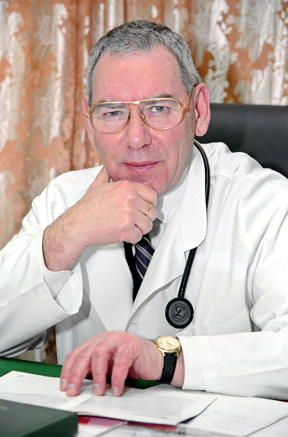 Леонид Борисович Лазебник (11.01.1941) — терапевт, доктор медицинских наук (1991), профессор (1992), ассистент, доцент, профессор МГМСУ (1970—1995), директор Центрального НИИ гастроэнтерологии (02.2001—07.2012), профессор ММСИ (1993—1995), професор РМАПО (1995—2001), профессор МГМСУ (с 2003).